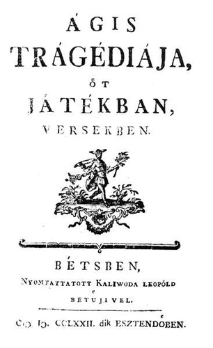 Az Ágis tragédiája című mű első kiadásának címlapja.